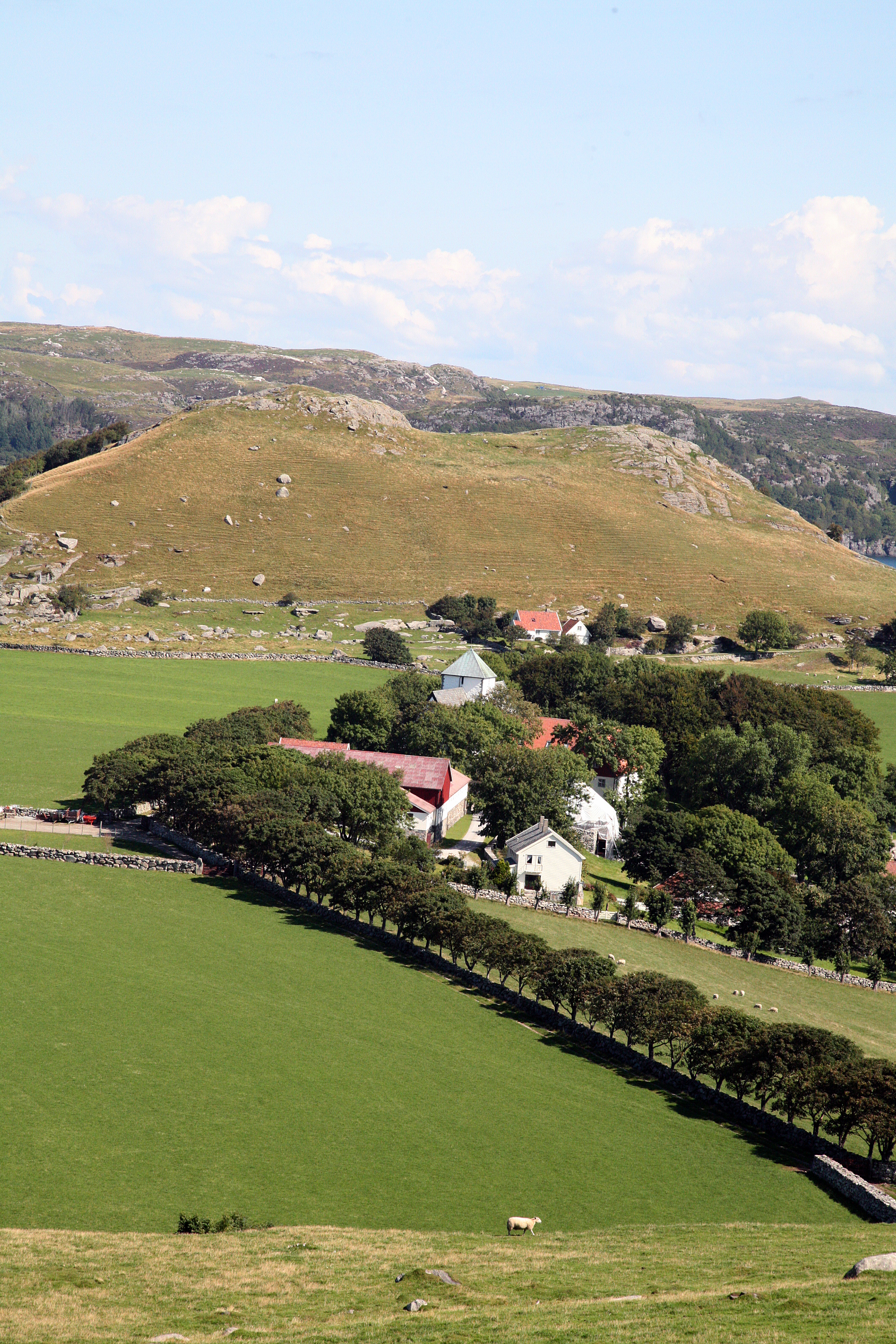 Utstein gard